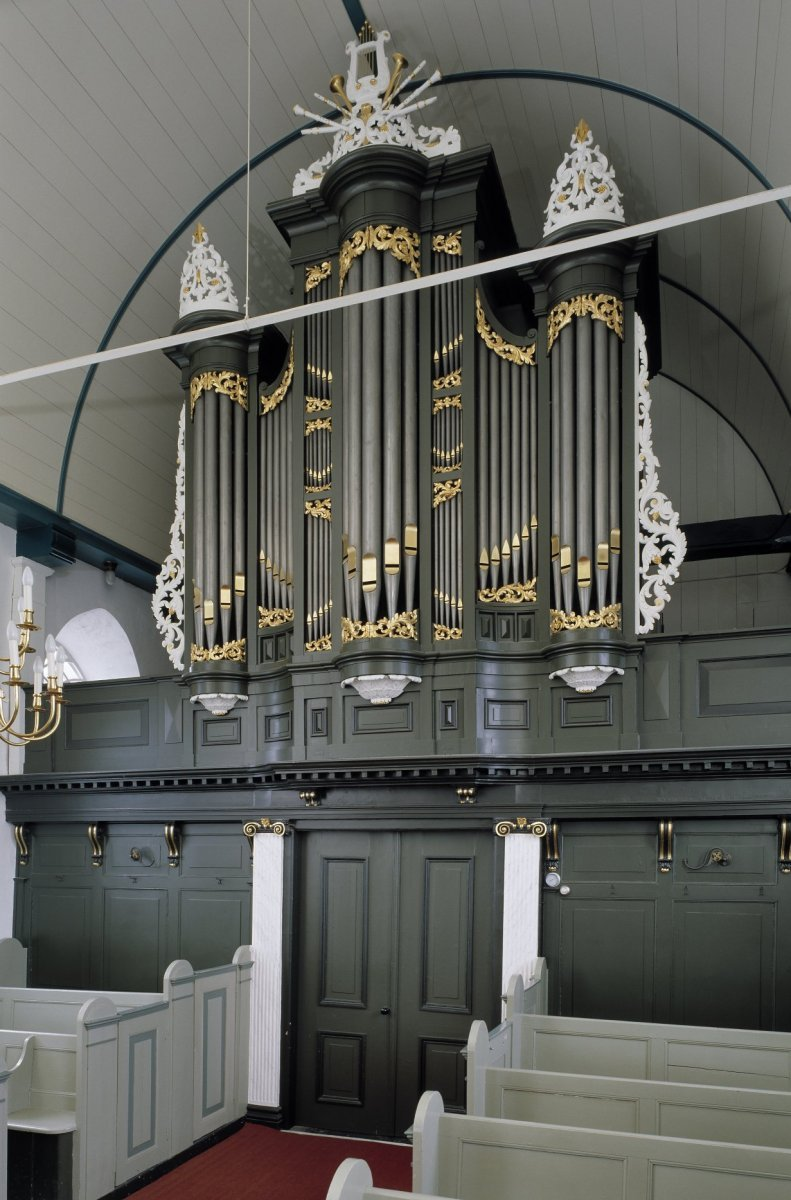 Nederlands Hervormde Kerk: Interieur, aanzicht orgel, orgelnummer 522 (opmerking: Gefotografeerd voor Het Historische Orgel in Nederland 1858-1865)